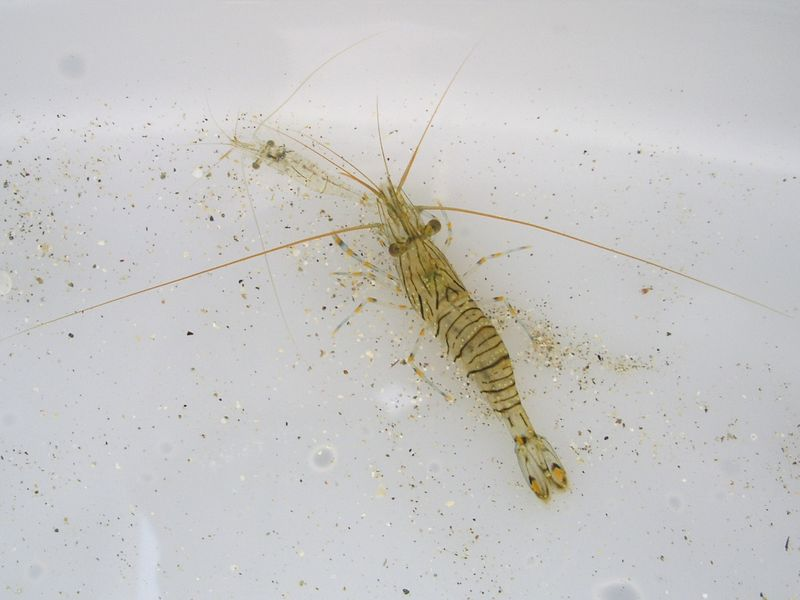 イソスジエビ, 長崎県西海市 (Palaemon pacificus, Saikai, Nagasaki)